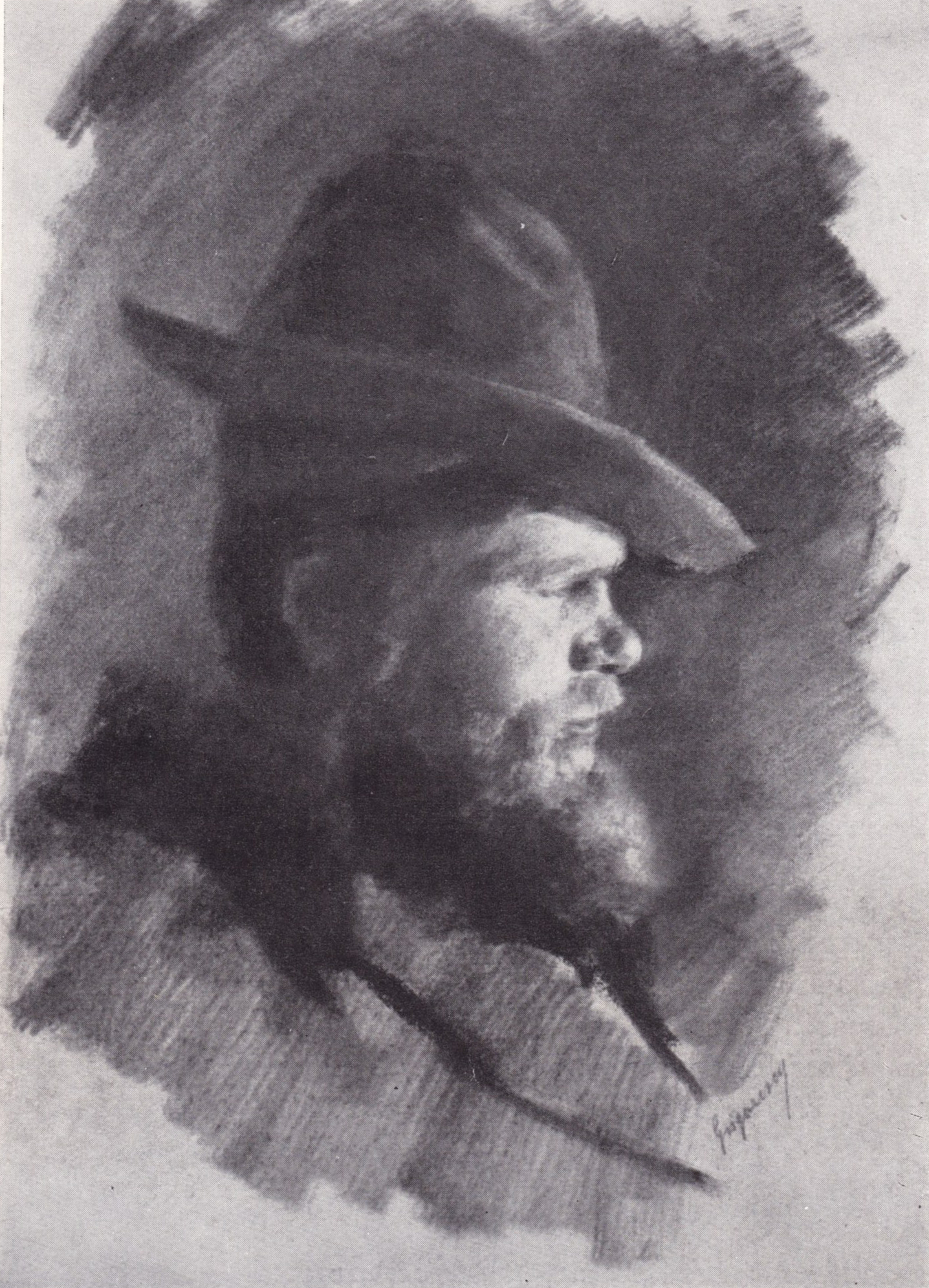 Portret de evreu, cărbune și estompă, 33,5x23cm, semnat dreapta jos: Grigorescu - Colecția George Oprescu